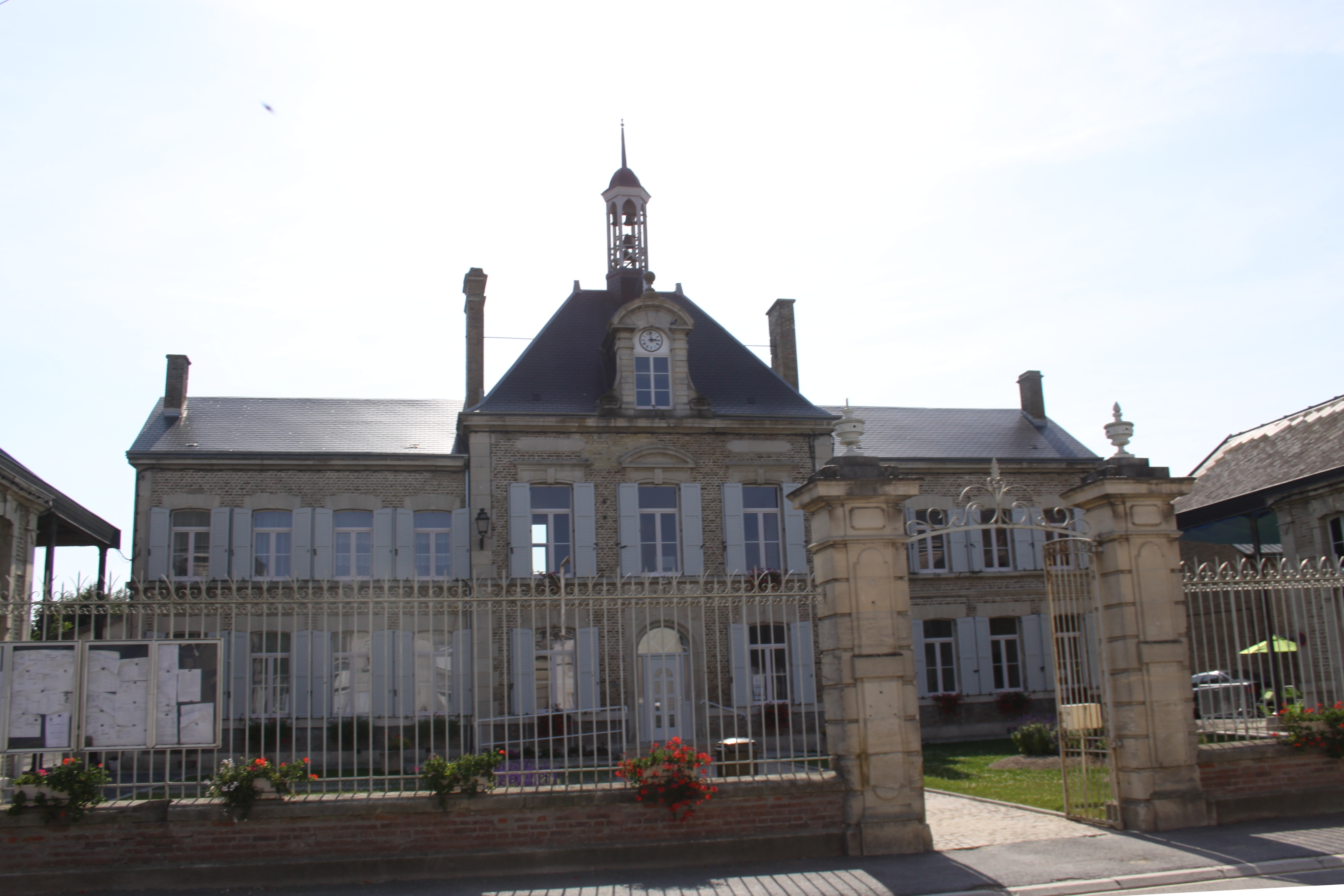 Village Ardennais